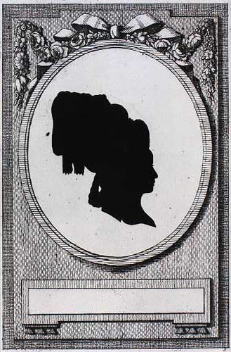 Juliana Marie Jessen (11.2.1760-6.10.1832), dansk forfatterinde